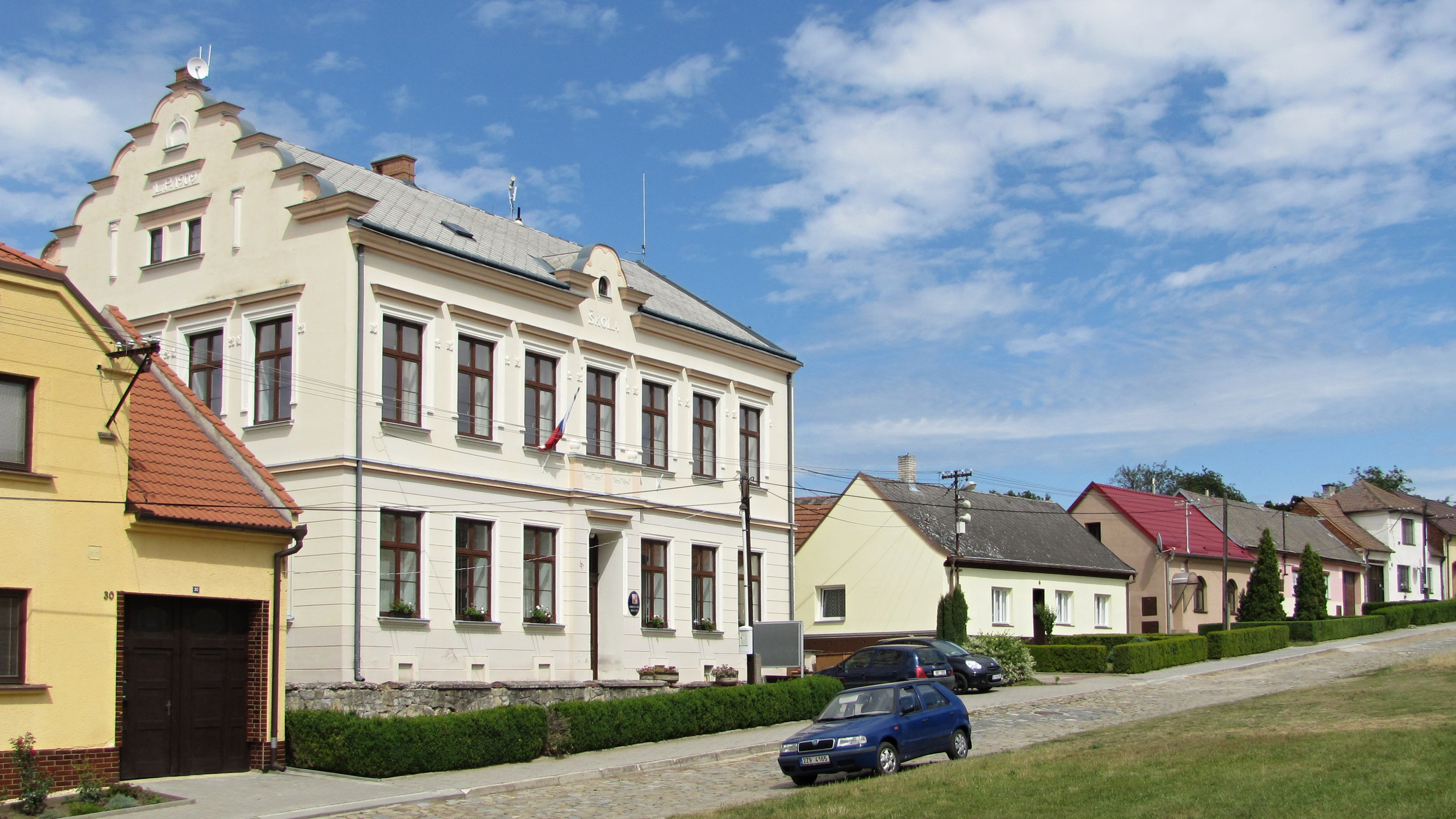 Obecní úřad v Kelčanech v budově bývalé školy z roku 1909